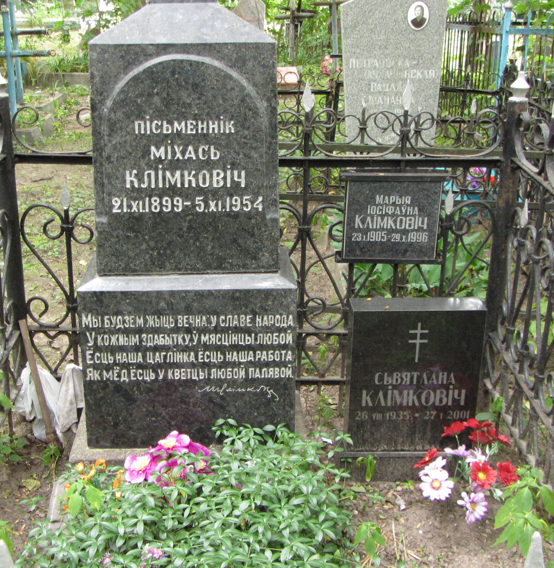 Беларуская (тарашкевіца): Помнік Міхасю Клімковічу. Вайсковыя могілкі, Менск